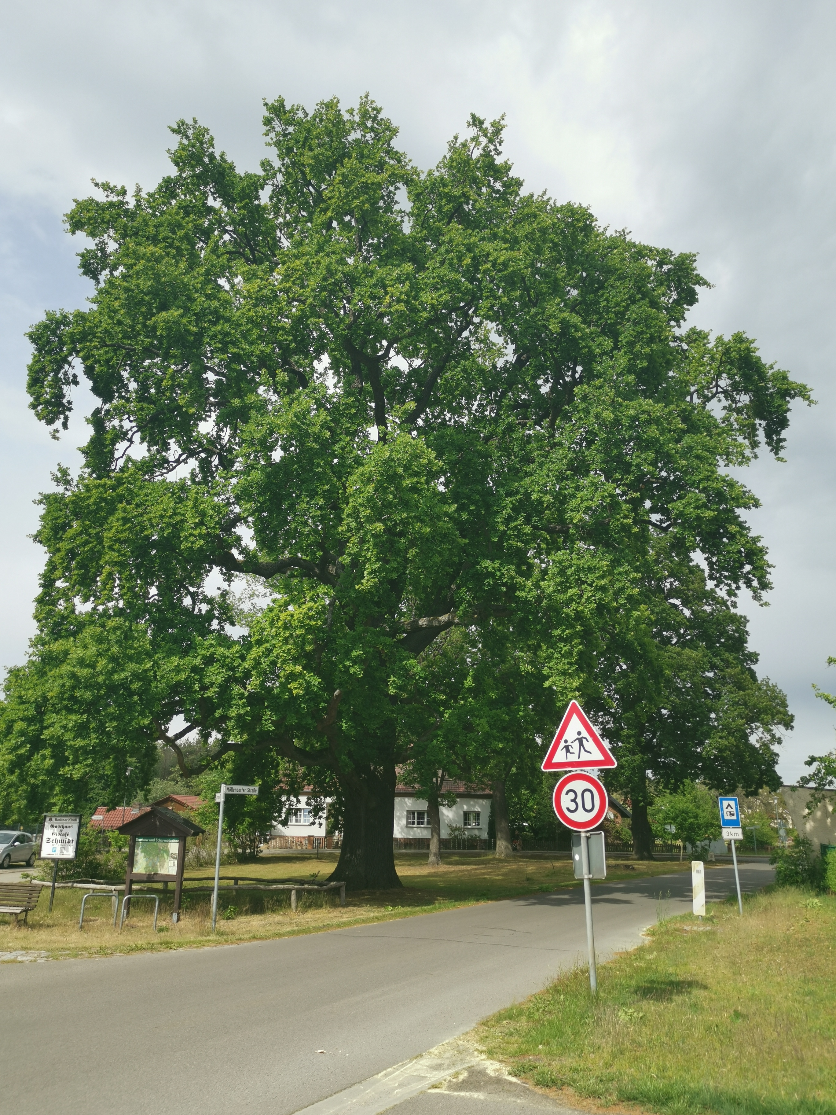 Als Naturdenkmal geschützte Friedenseiche in Limsdorf